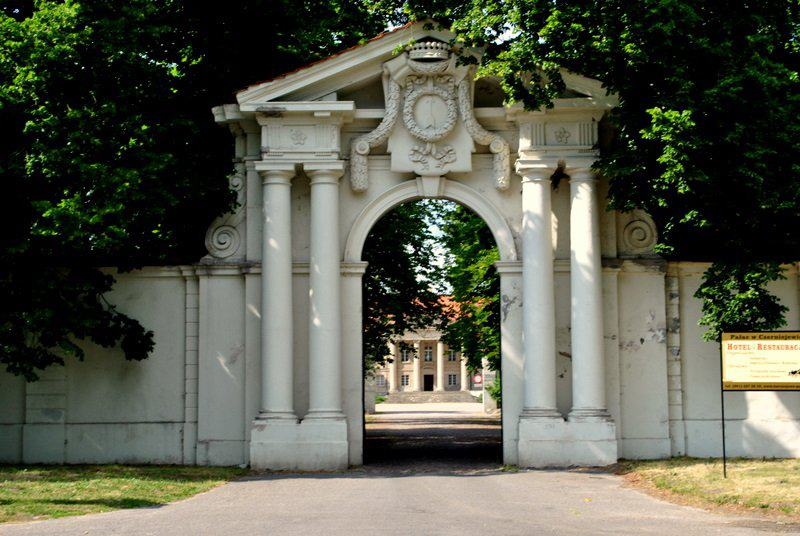 Czerniejewo - zespół pałacowy z XVIII-XX w.: brama wjazdowa (zabytek nr 3/A)